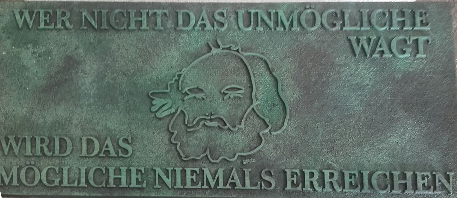 Placa de la Tumba de Bakunin en el cementerio Bremgartenfriedhof en Berna, Suiza,con una lapida encargada al artista suizo Daniel Garbade ,con un dibujo de bakunin,por los Dadaistas de Zurich